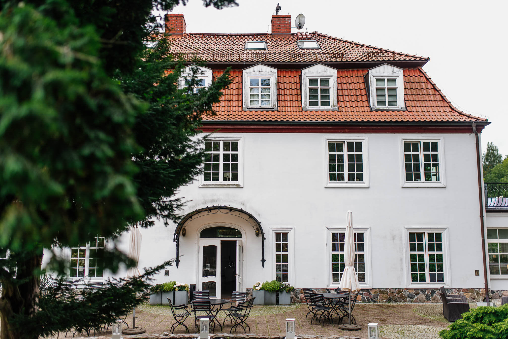 Zabytkowy Dwór Oliwski w Gdańsku.